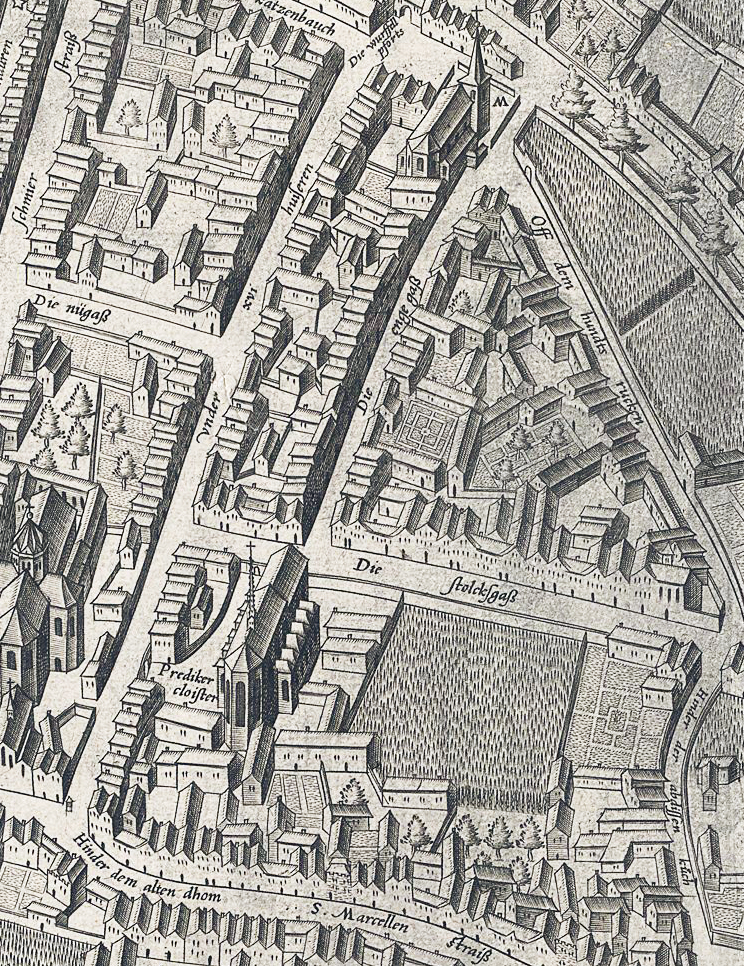 Ausschnitt des Mercator – Stadtplanes Köln. Bereich „Unter Sachsenhausen, Enggasse, Stolkgasse und Umgeld um 1570/71“